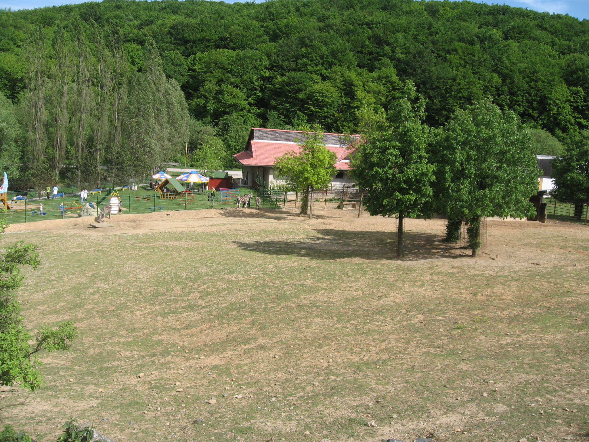 Košická zoologická záhrada